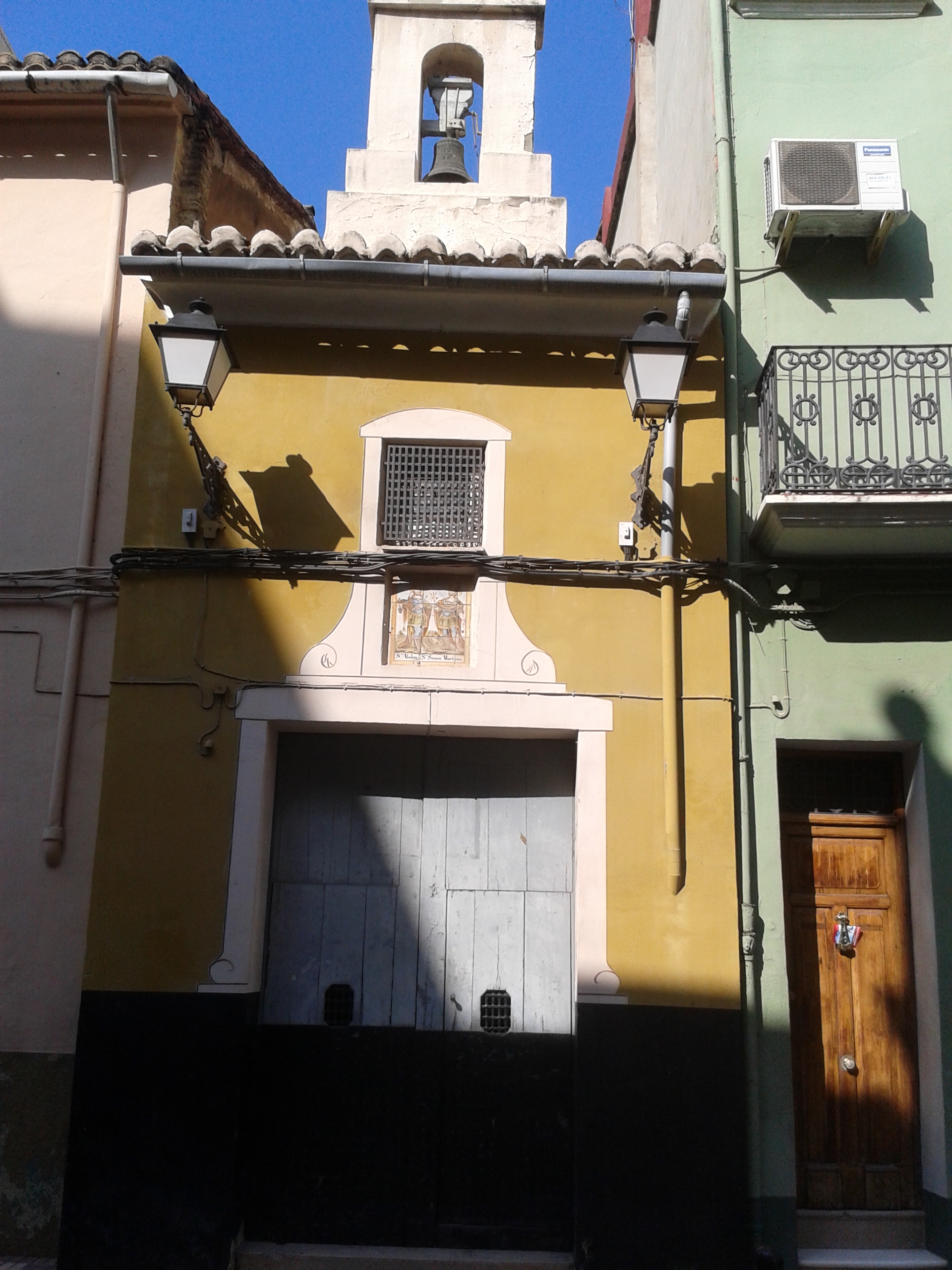 Capella dels Sants Abdó i Senén 20.029-010.